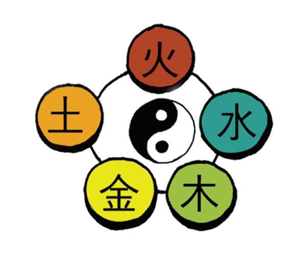 음양오행설의 이해를 돕기 위한 그림